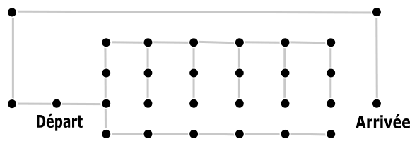 Légende : Ce graphe représente un labyrinthe simple (le chemin est évident). Chaque arc est bidirectionnel, avec un coût proportionnel à sa dimension. Source : image perso Contents 1 Licensing 2 Voir aussi 3 Licensing 4 Original upload log Licensing Voir aussi Image:Schema Astar.png